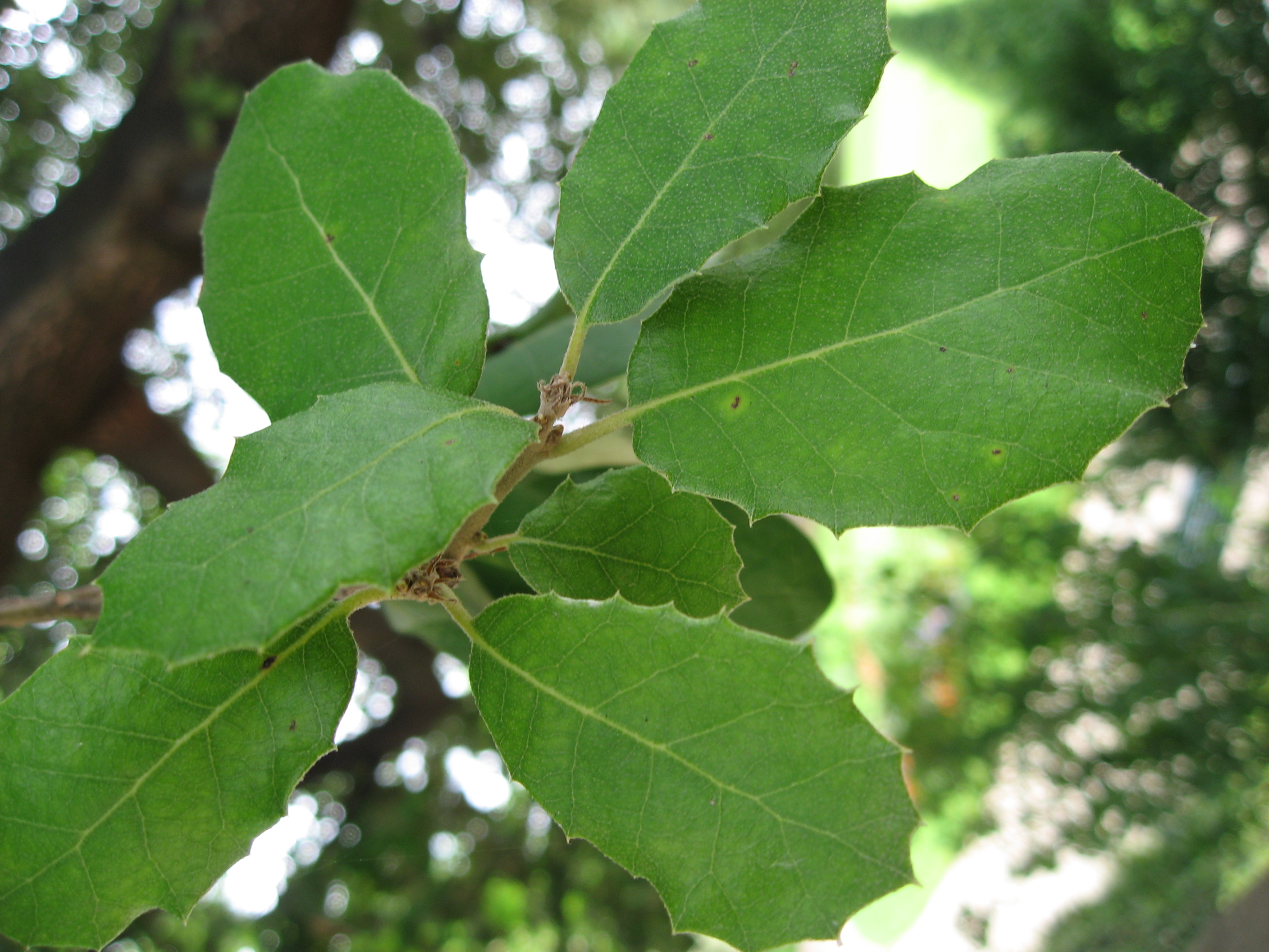 Quercus ilex in Serres d'Auteuil Map: 48° 50' 49" N 2° 15' 8" E